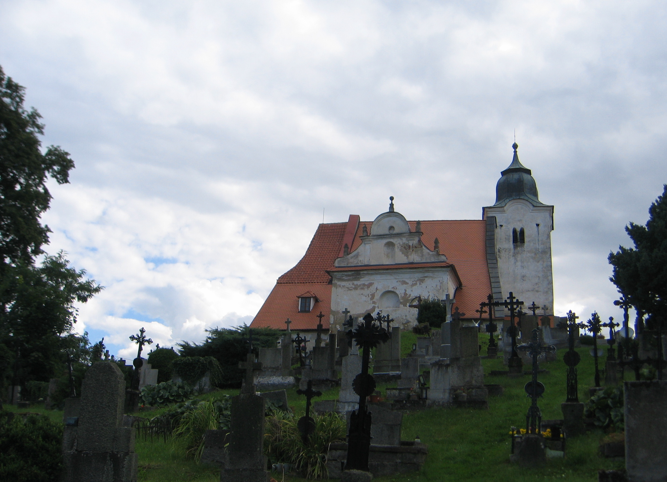 Bukovník (okr. Klatovy), kostel sv. Václava od severu.